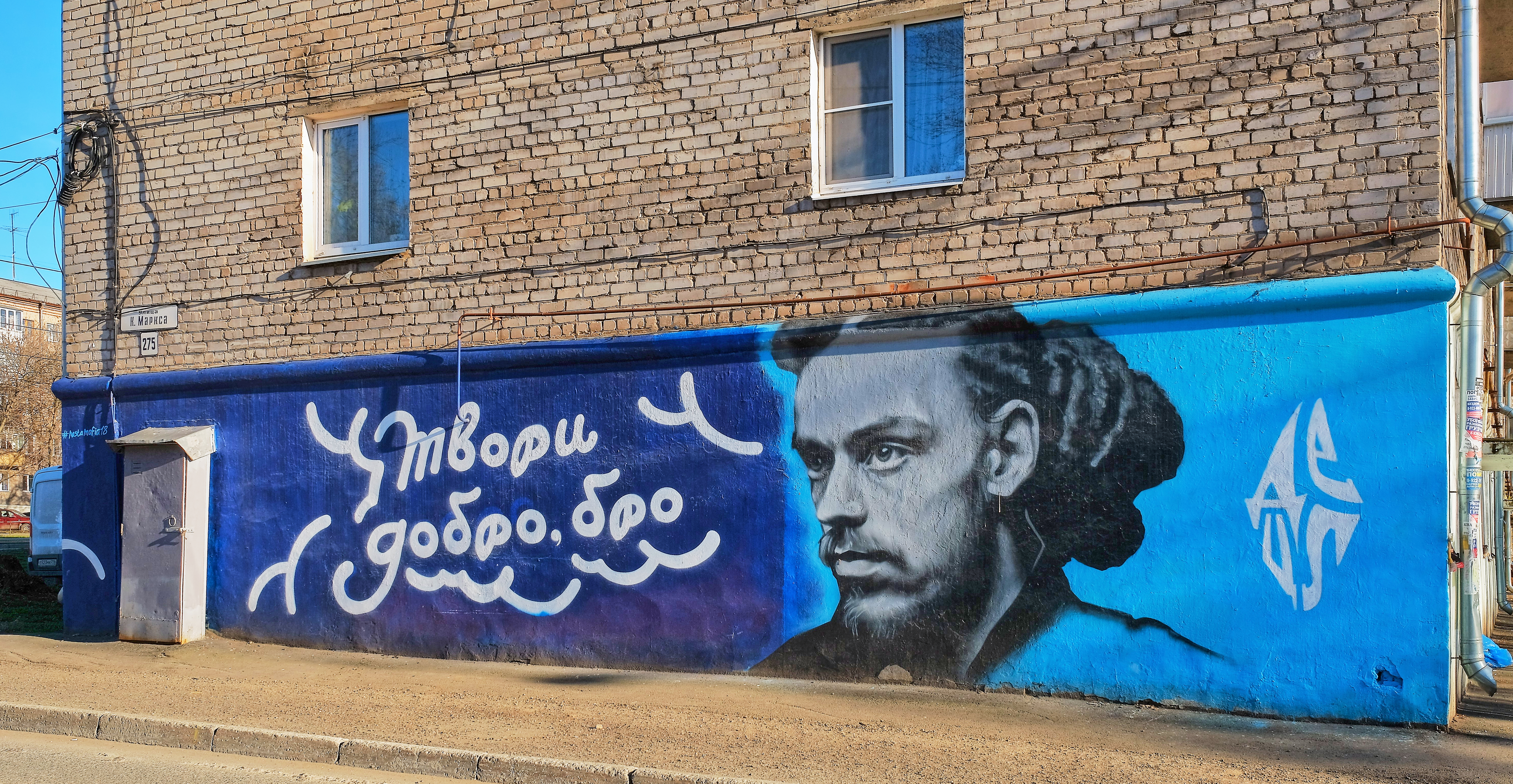 Граффити с изображением Кирилла Толмацкого на доме № 275 по ул. К. Маркса в Ижевске